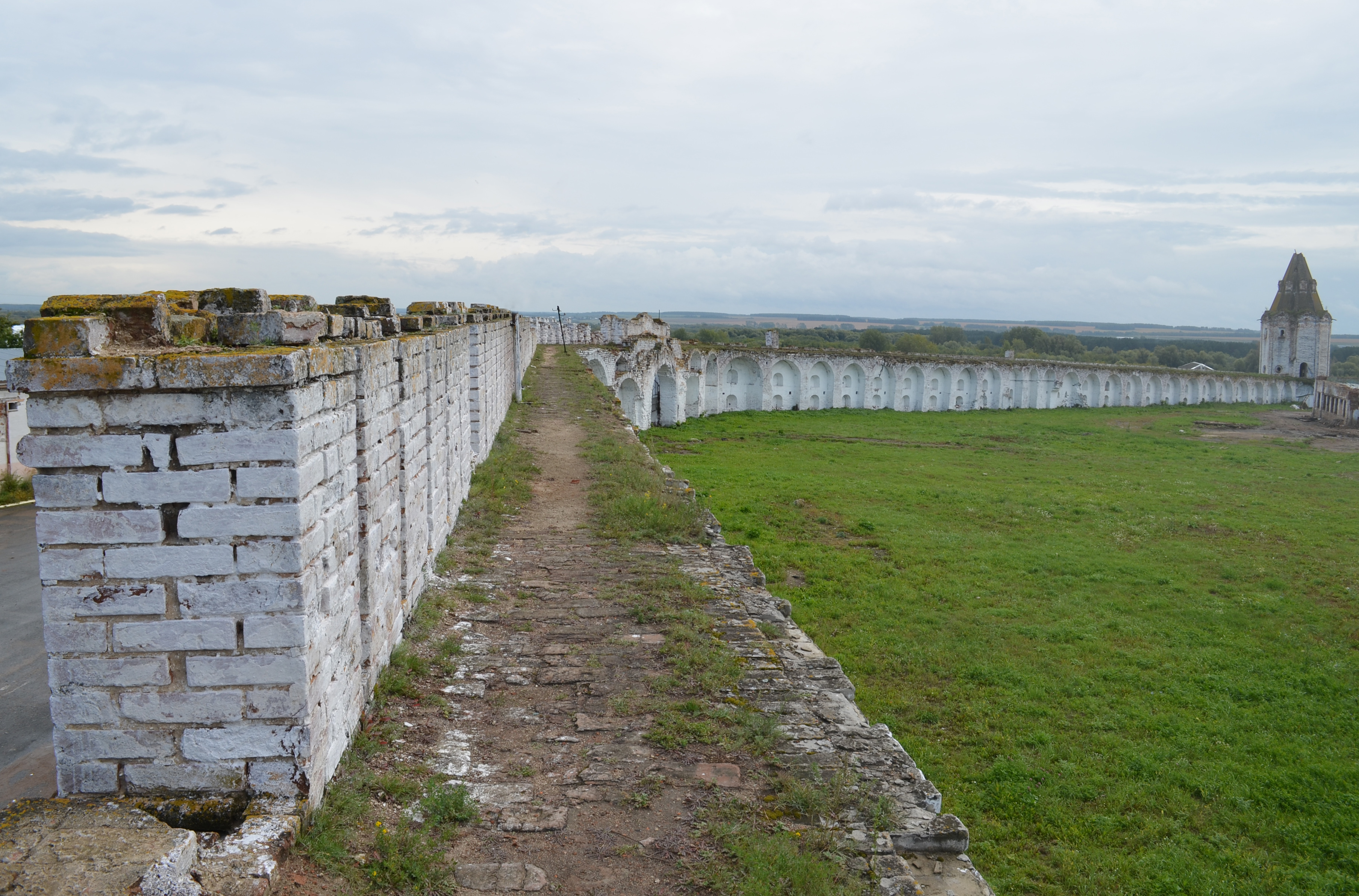 Красный бастион (башня западная) (руины) (Курганская область, Далматово, улица Советская, 63)